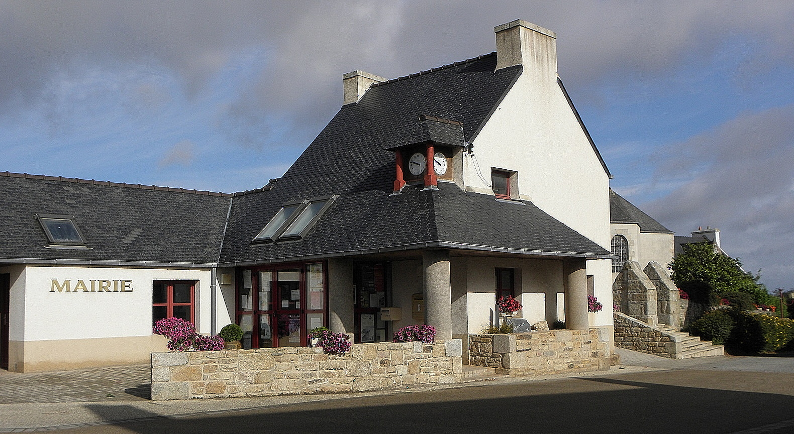 Mairie de Trézilidé (29).